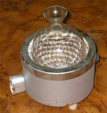 Czapa grzejna